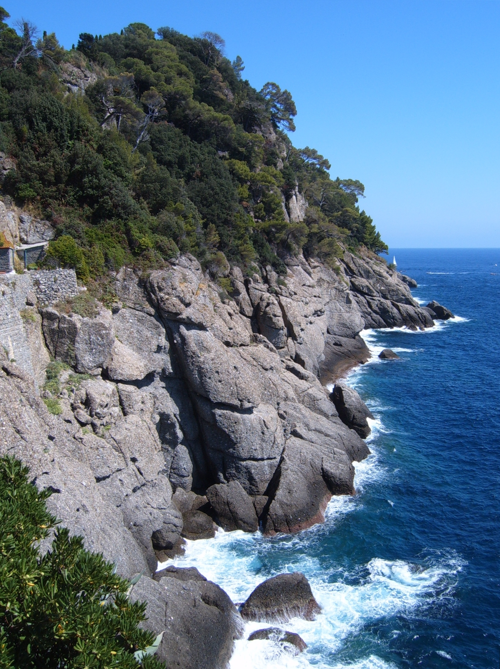 View from Chiesa San Giorgio, Portofino, Riviera di Levante, Italy